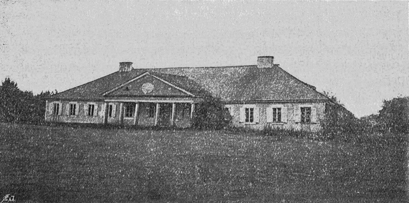 Беларуская (тарашкевіца): Лугамавічы (Łuhamavičy), сядзіба Корвін-Мілеўскіх (Korvin-Mileŭski)